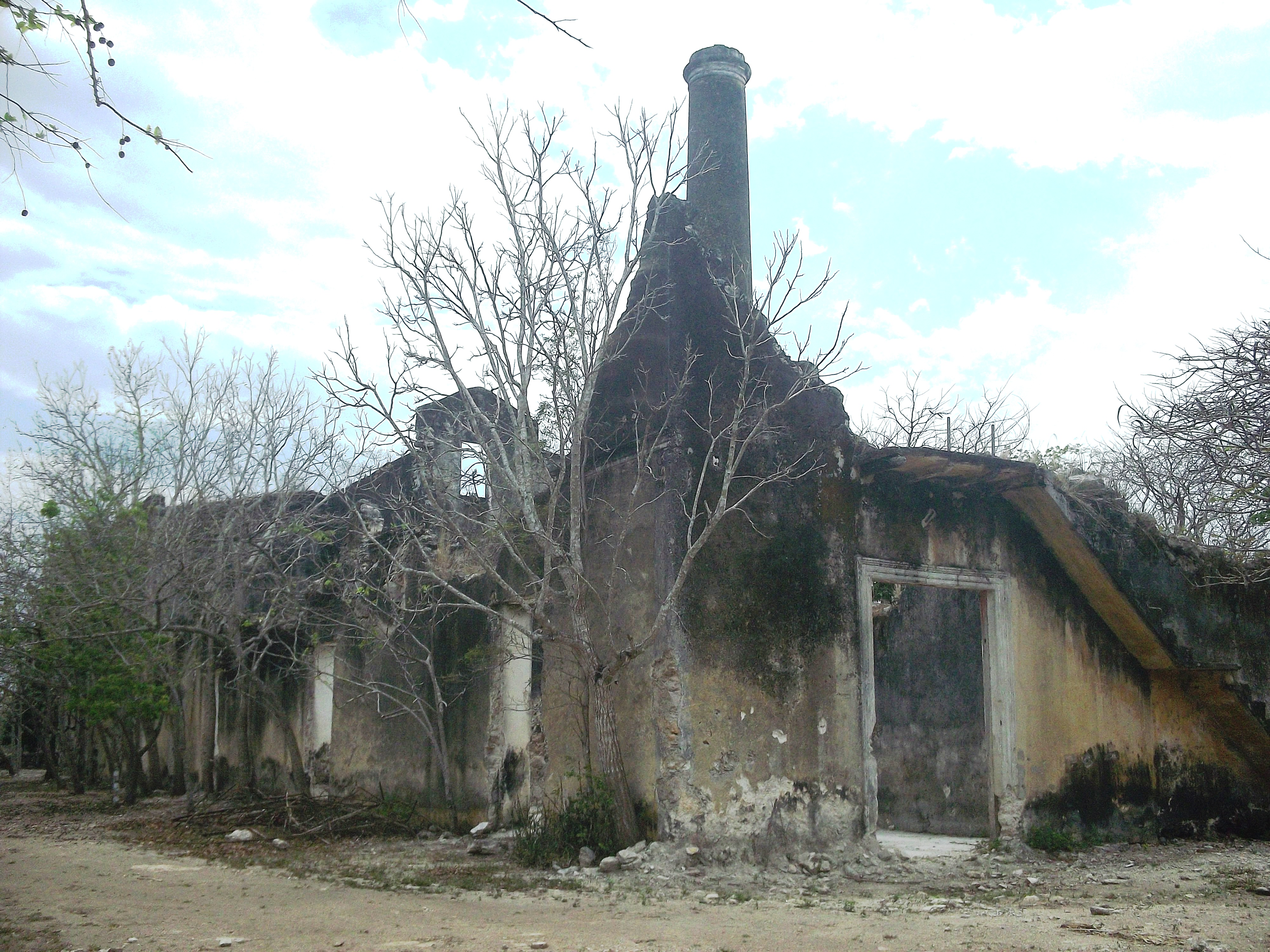 Vista de la hacienda San Diego, Yucatán.